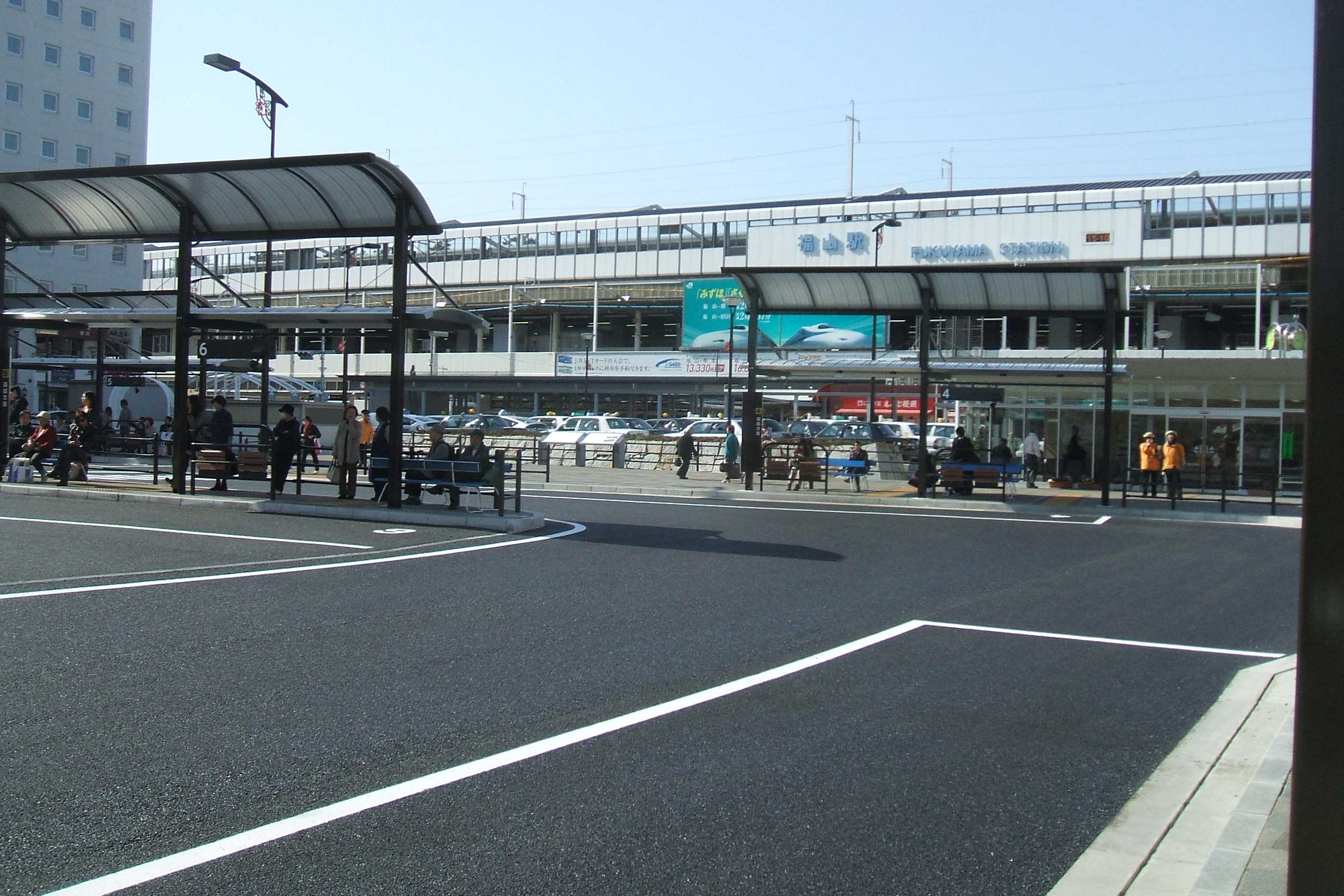 福山駅南口にあるバスターミナルとタクシー乗り場南東方向より撮影